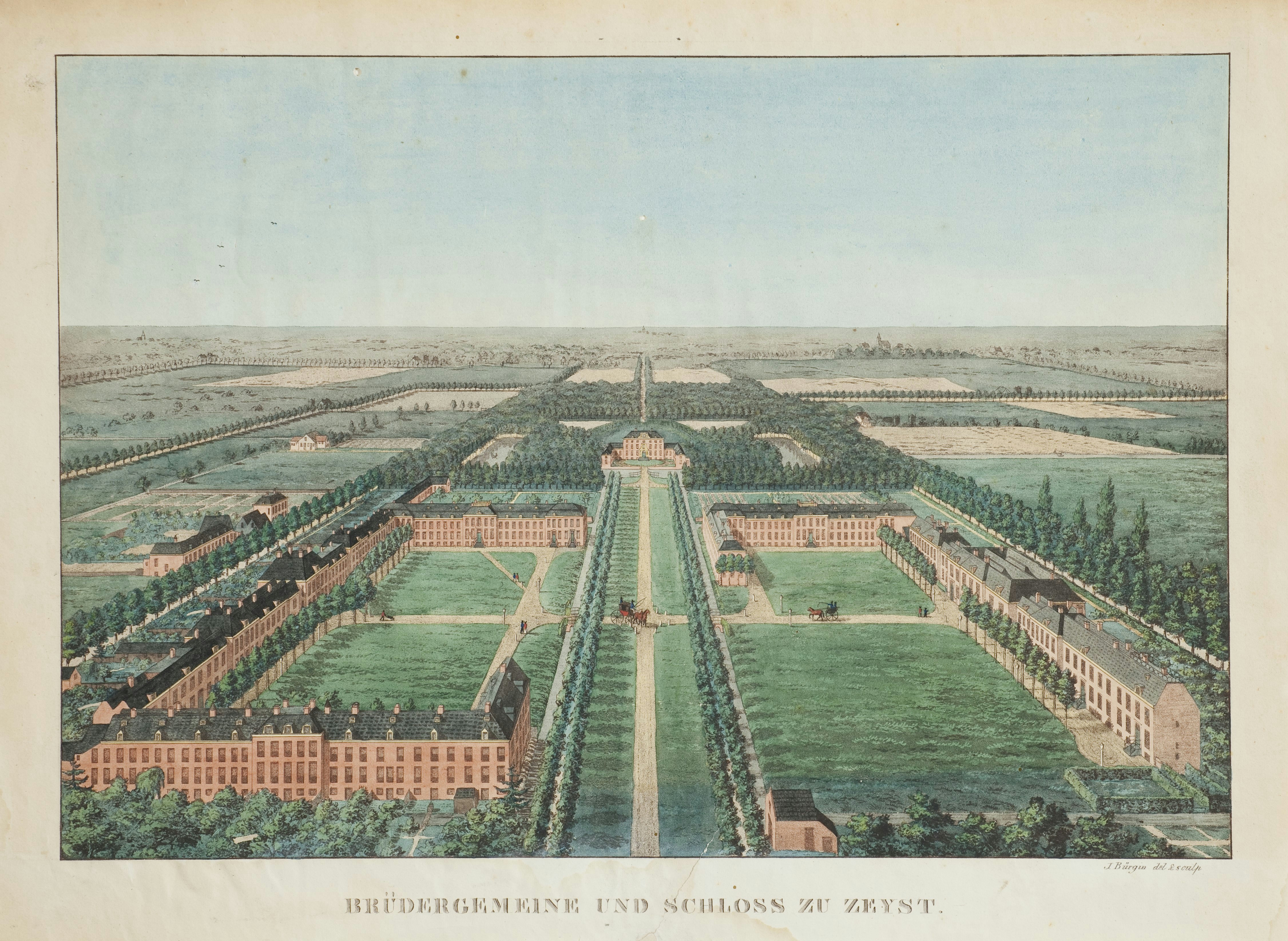 Slot Zeist: Gravure, overzicht van Het Slot met Broedergemeente, vogelvlucht